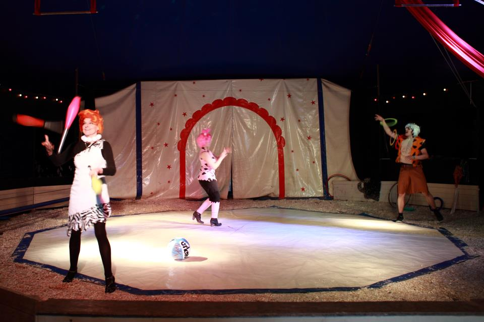 Mitmachcircus